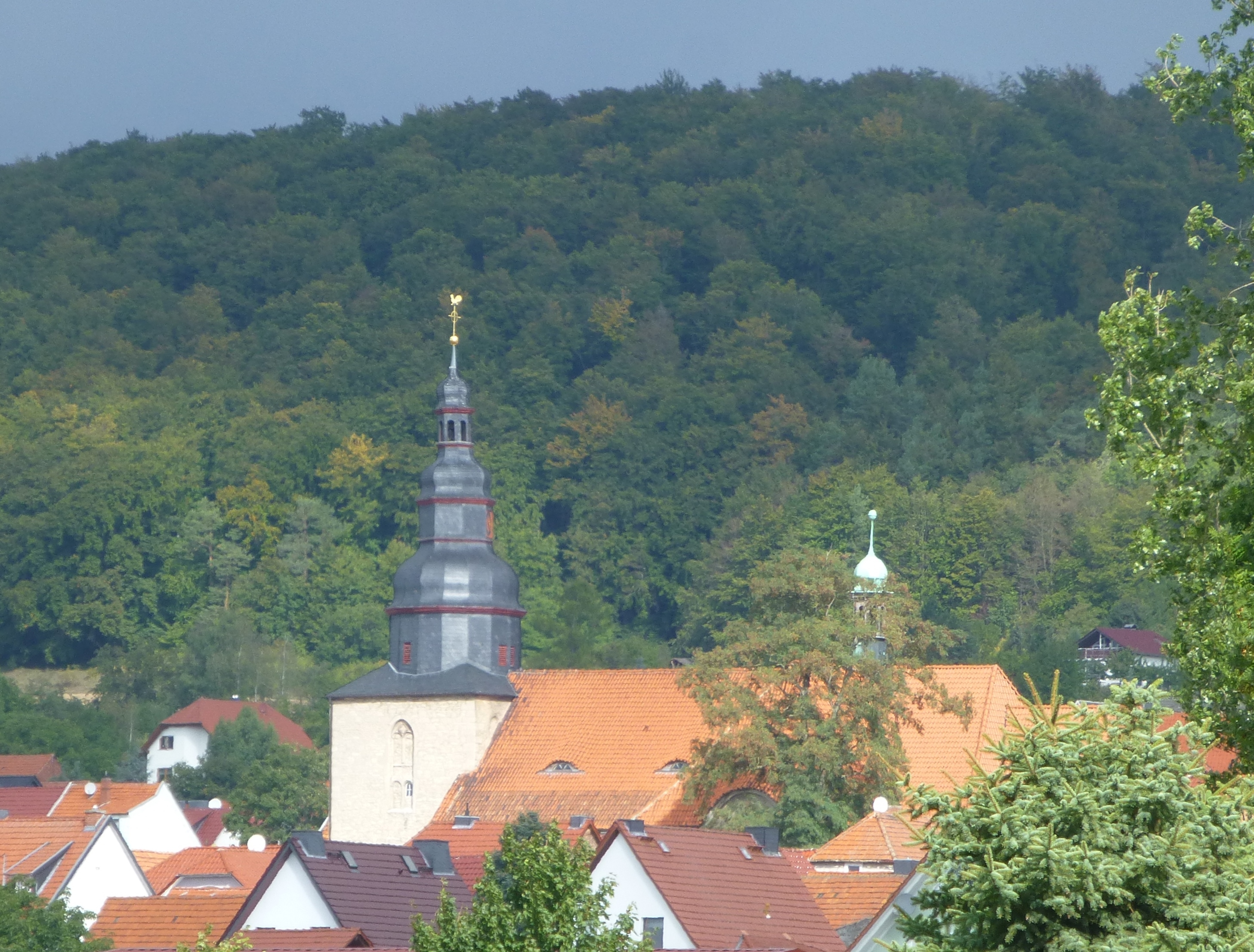 Blick über Kirchworbis